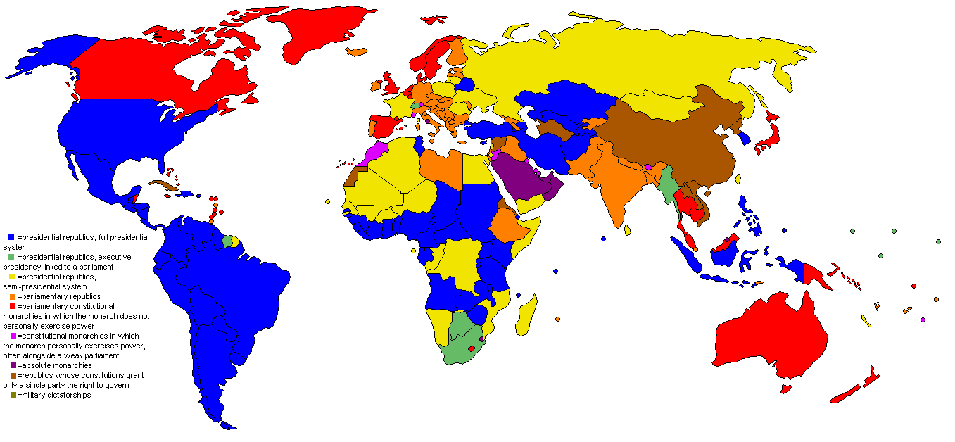 Land naar politiek-systeem.